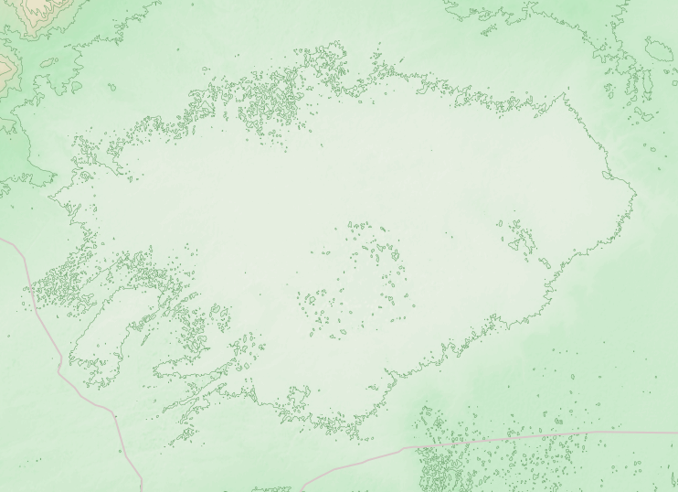 Bajo de la Tierra Colorada, Chubut, Argentina - Open Street Map